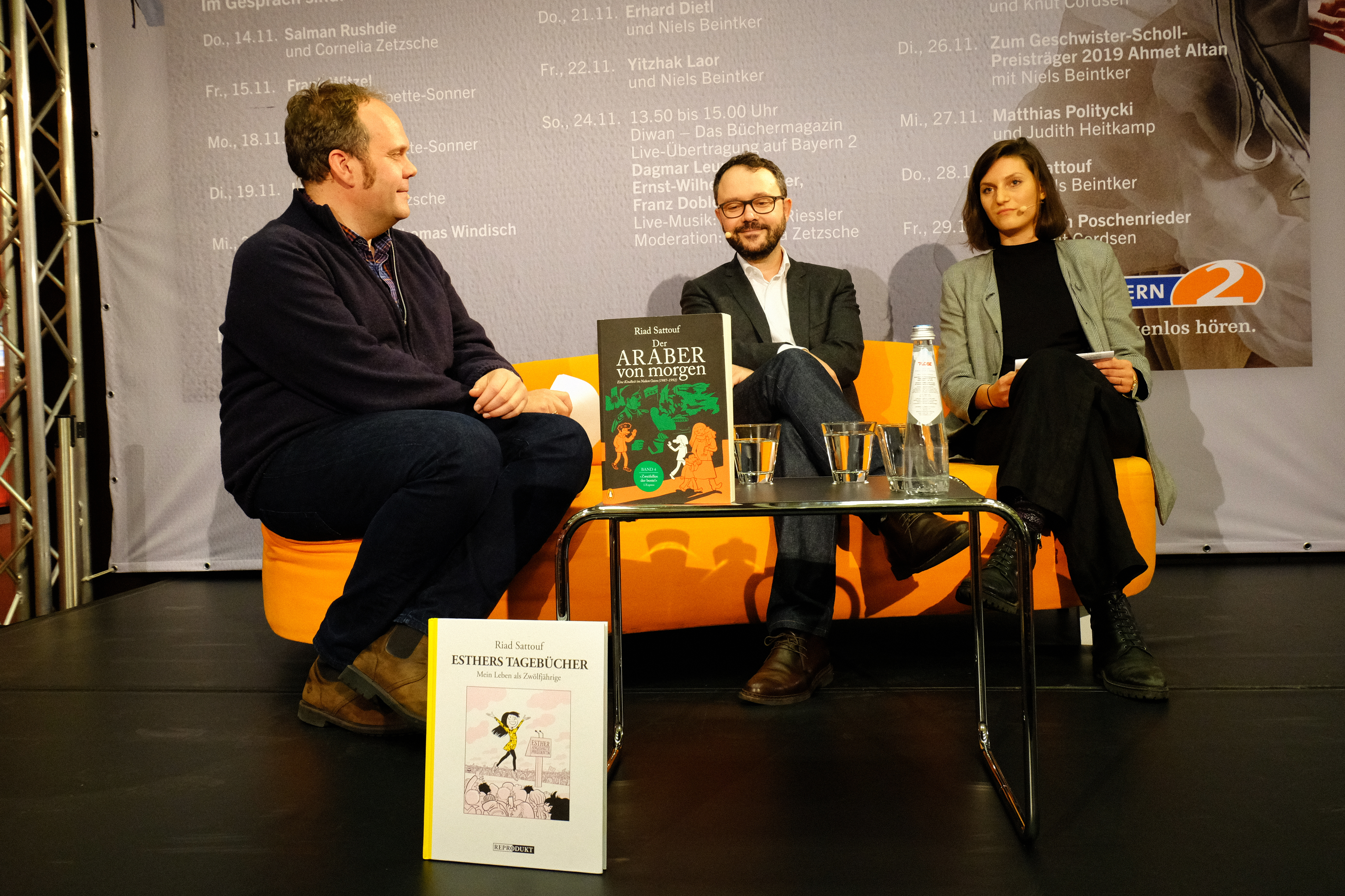 Riad Sattouf (Mitte) auf dem Bayern 2-Diwan anlässlich der 60. Münchner Bücherschau 2019. Links im Bild Moderator Niels Beintker, rechts Übersetzerin Anna-Elena Knerich